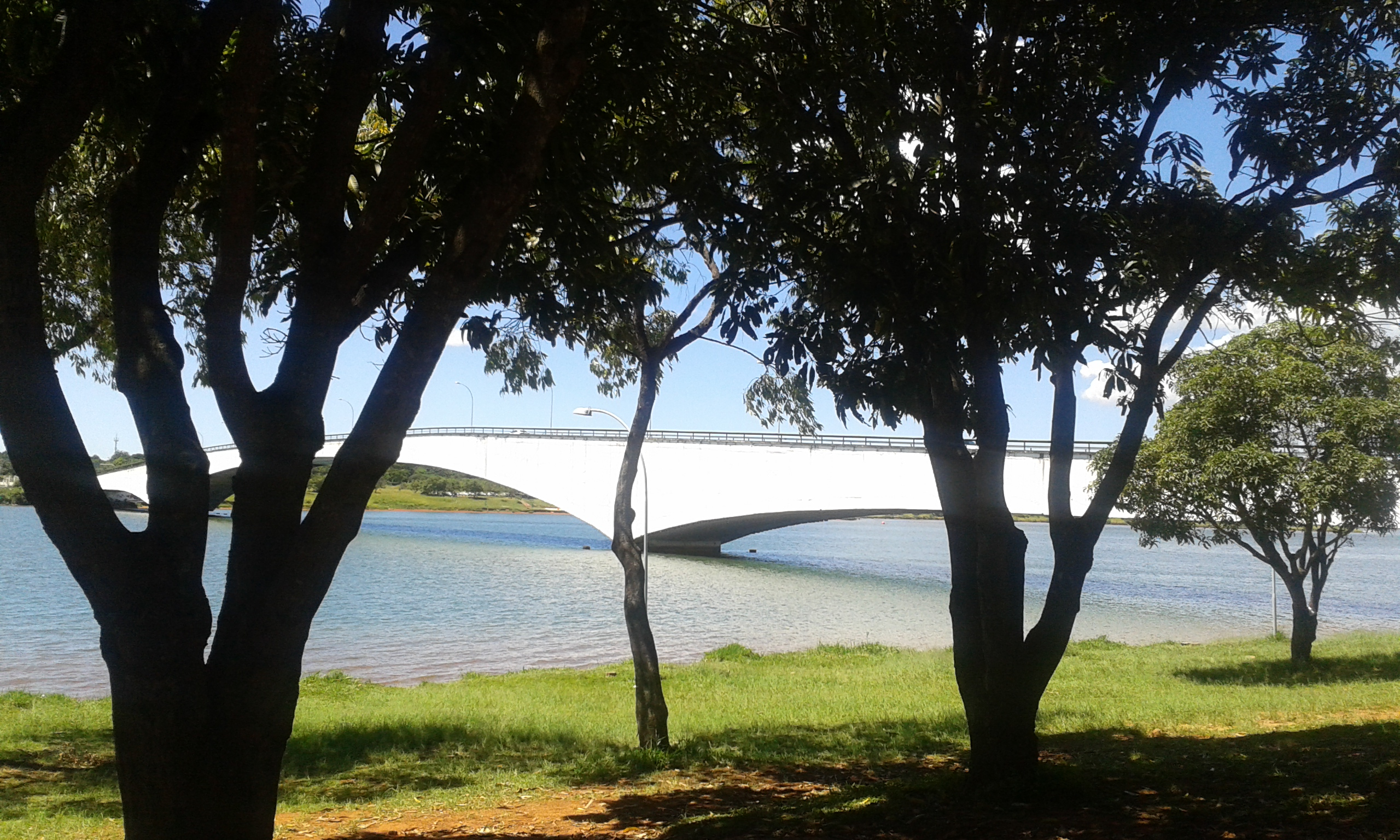 St. de Clubes Esportivos Sul Trecho 2 - Asa Sul, Brasília - DF, Brazil